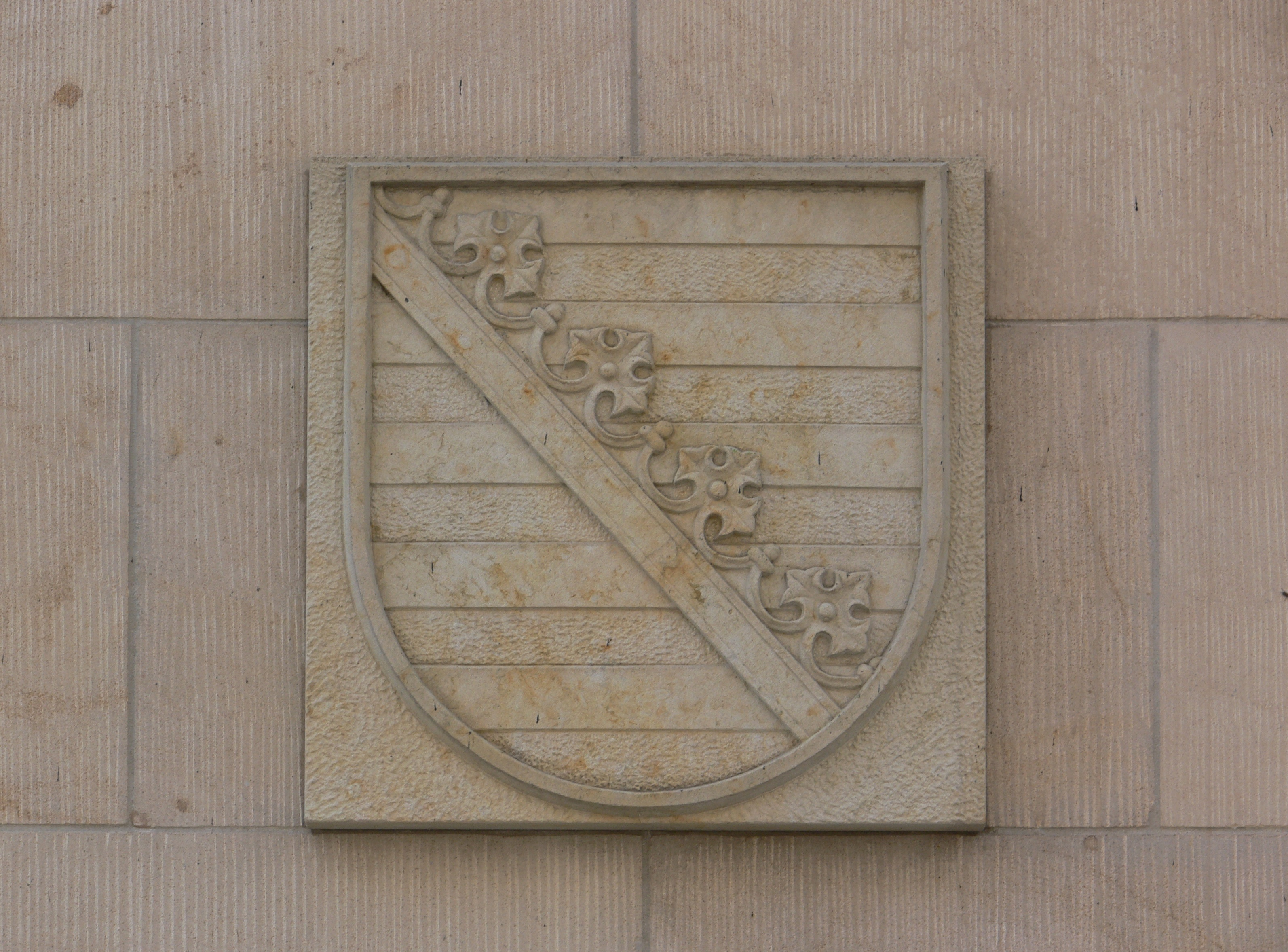 Berlin-Mitte, Brüderstraße 11-12, Sächsische Landesvertretung, Sächsisches Wappen